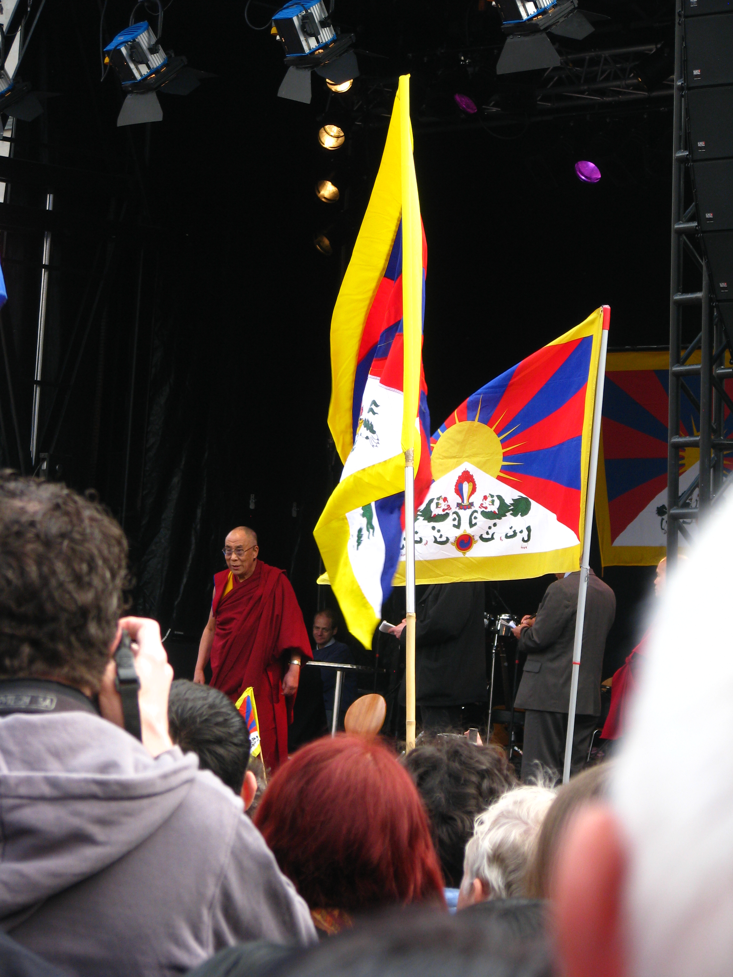 Seine Heiligkeit der 14. Dalai Lama an der Solidaritätskundgebung Die Schweiz für Tibet - Tibet für die Welt vom 10. April 2010, veranstaltet von der Gesellschaft Schweizerisch-Tibetische Freundschaft (GSTF) auf dem Münsterhof in Zürich.